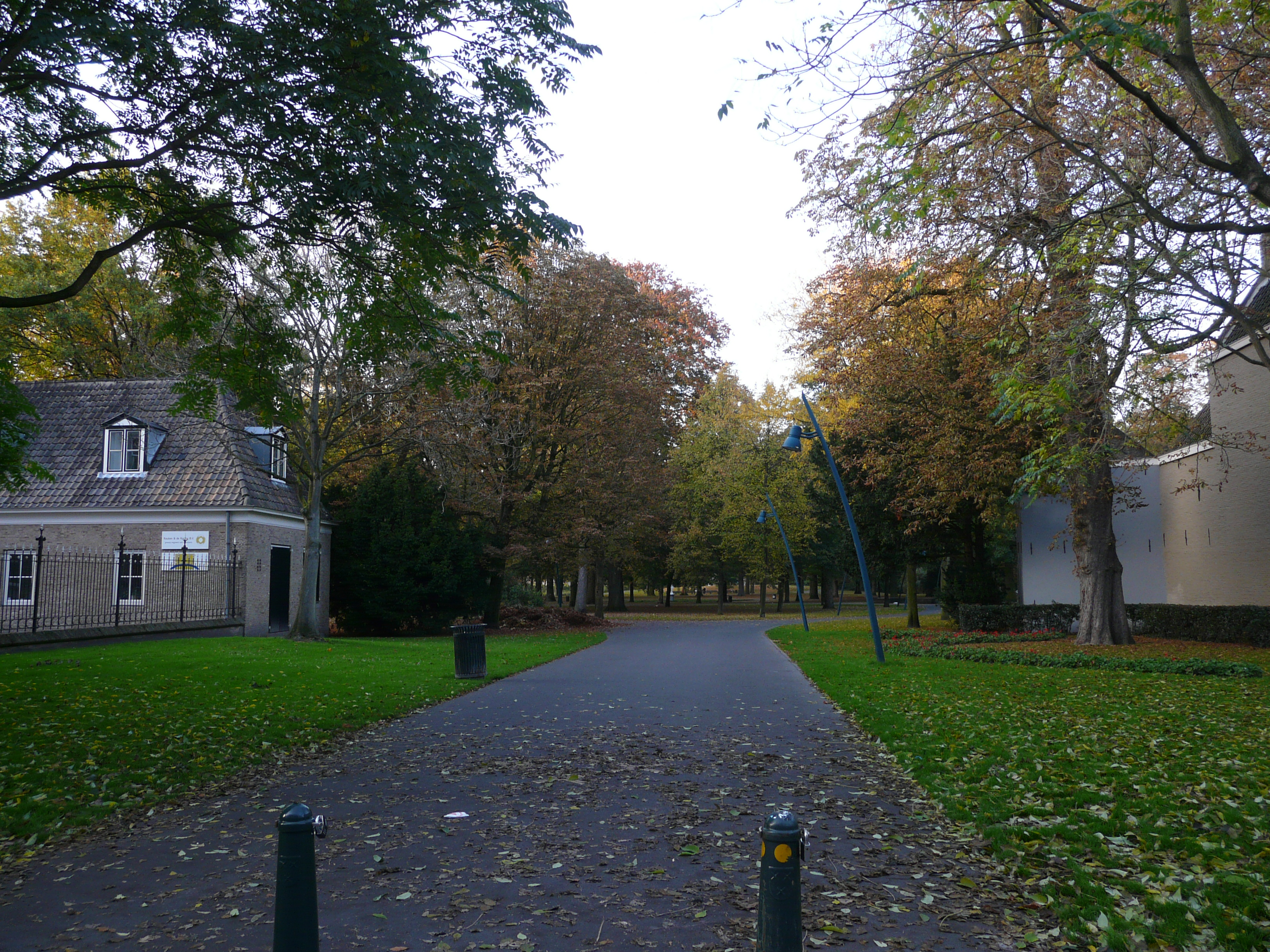 Zicht op een deel van het Park Valkenberg. Gelegen nabij het Station Breda en het centrum van Breda